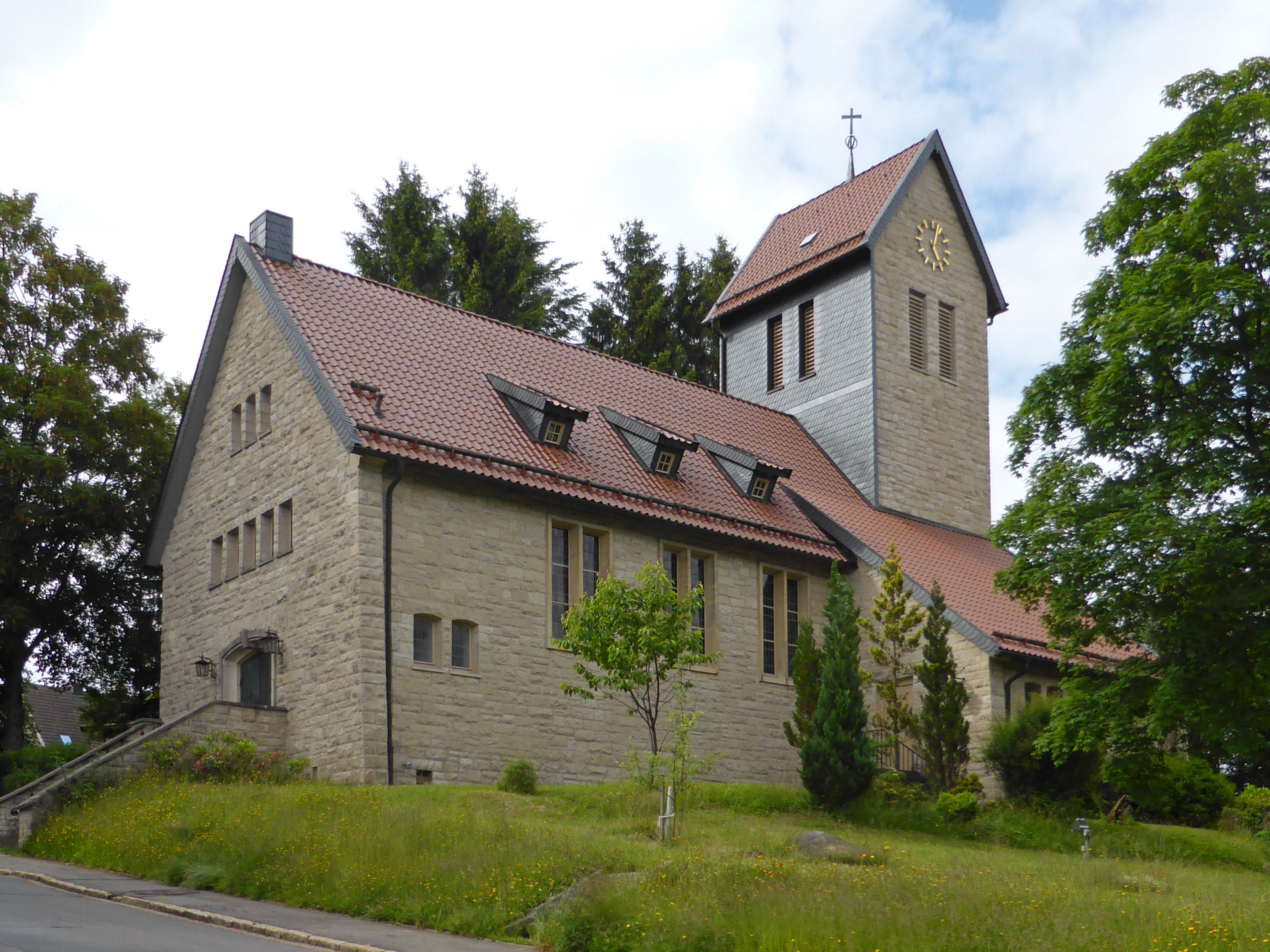 Evangelische St.-Petrus-Kapelle in Schulenberg im Harz.